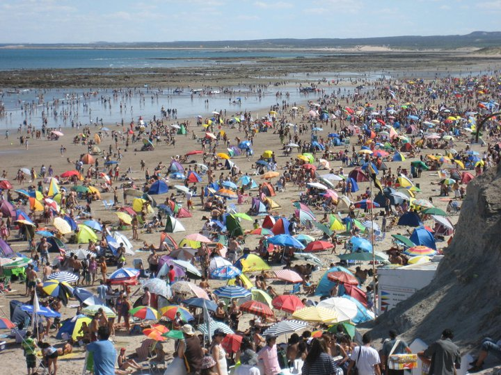 Playa Las Grutas: temporada 2011